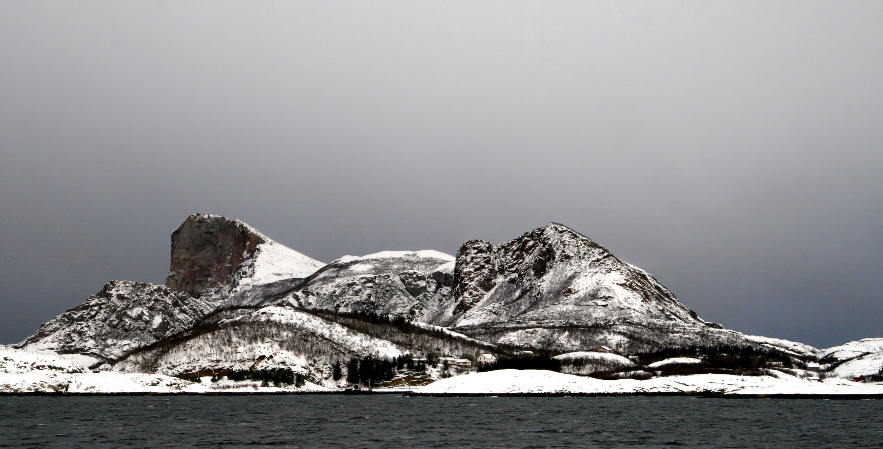 De rode rots van Rødøy tijdens de winter 2006